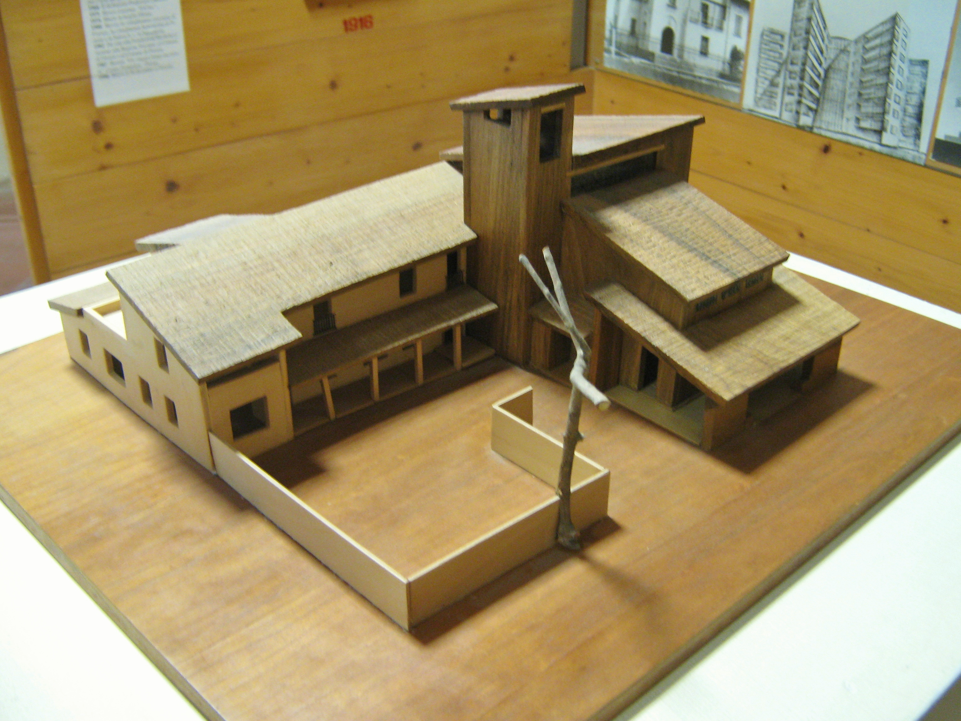 Pistoia, Museo Civico (Palazzo Comunale): modello della chiesa di Collina, presso Pistoia.